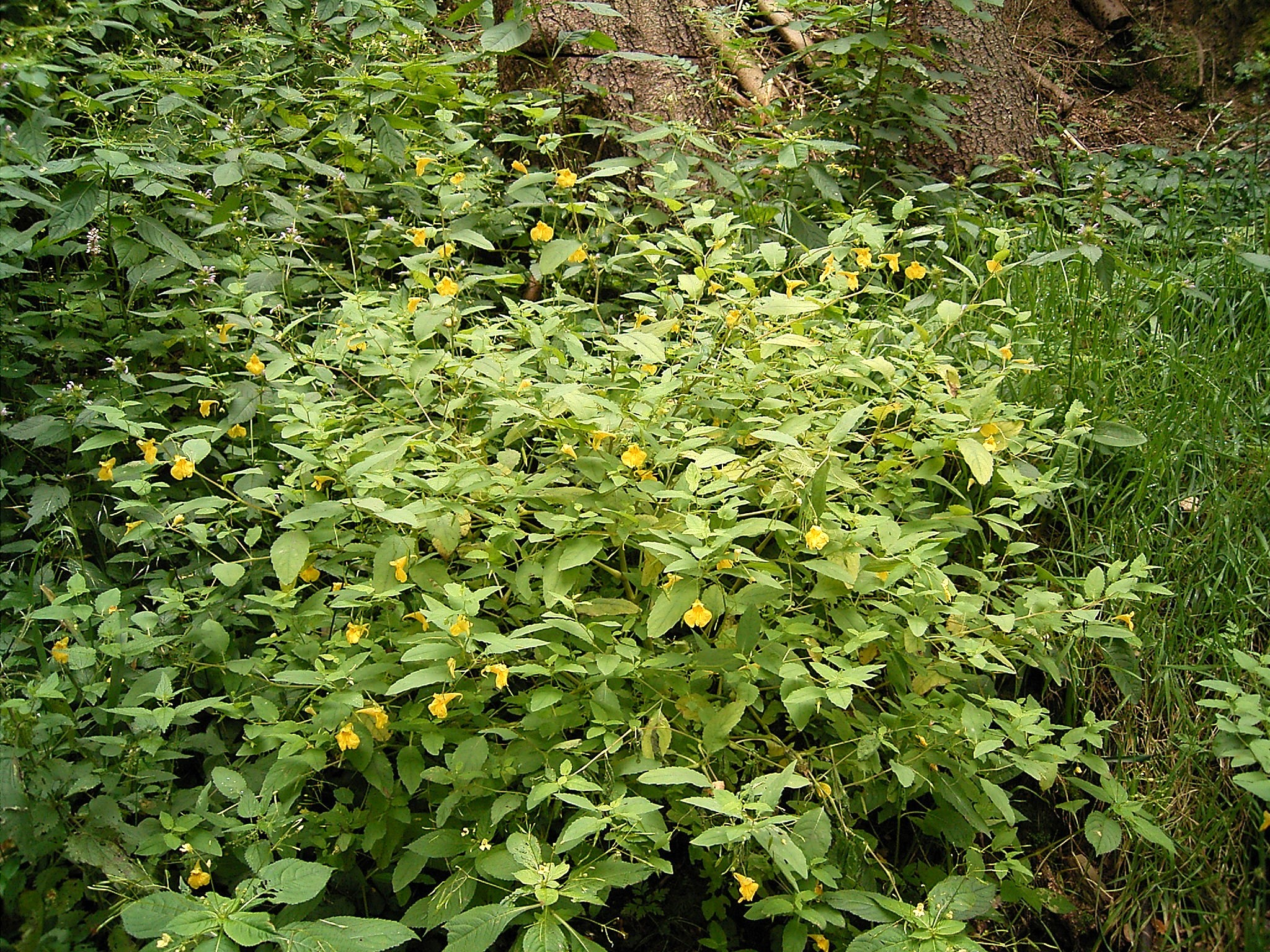 Impatiens noli-tangere